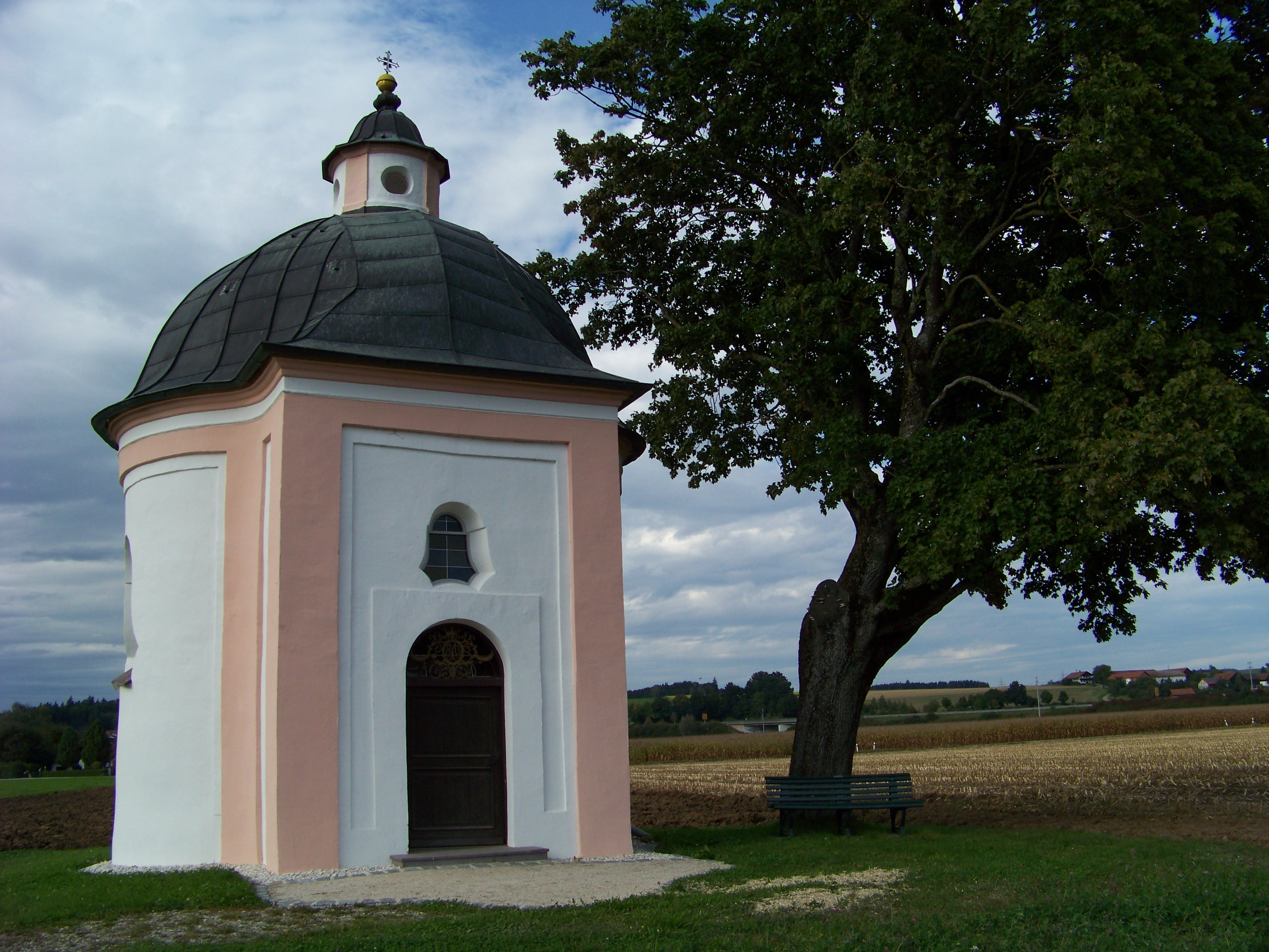 Postmünster, Kapellenweg 5. Hustenmutterkapelle, Zentralbau von 1748; mit Ausstattung; nordöstlich auf dem Wiesengrund jenseits der Rott.